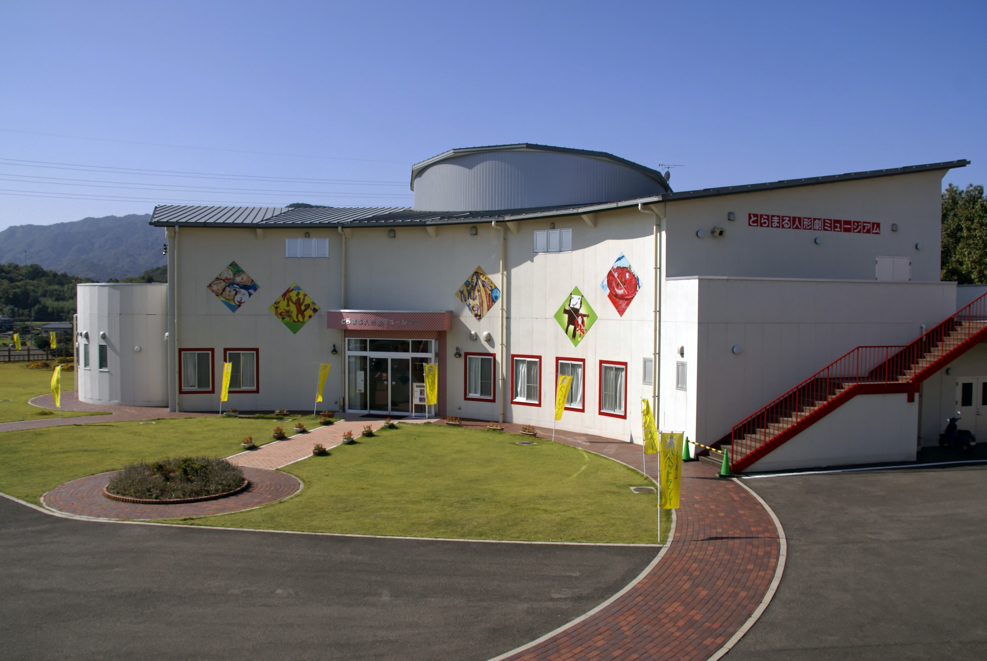 Toramaru Park in Higashikagawa, Kagawa prefecture, Japan